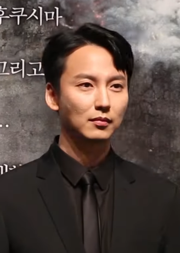 김남길(Kim Nam Gil) (영화 '판도라' 제작보고회)